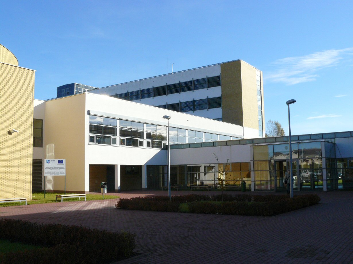 Wydział Nauk Geograficznych i Geologicznych Uniwersytetu im. Adama Mickiewicza